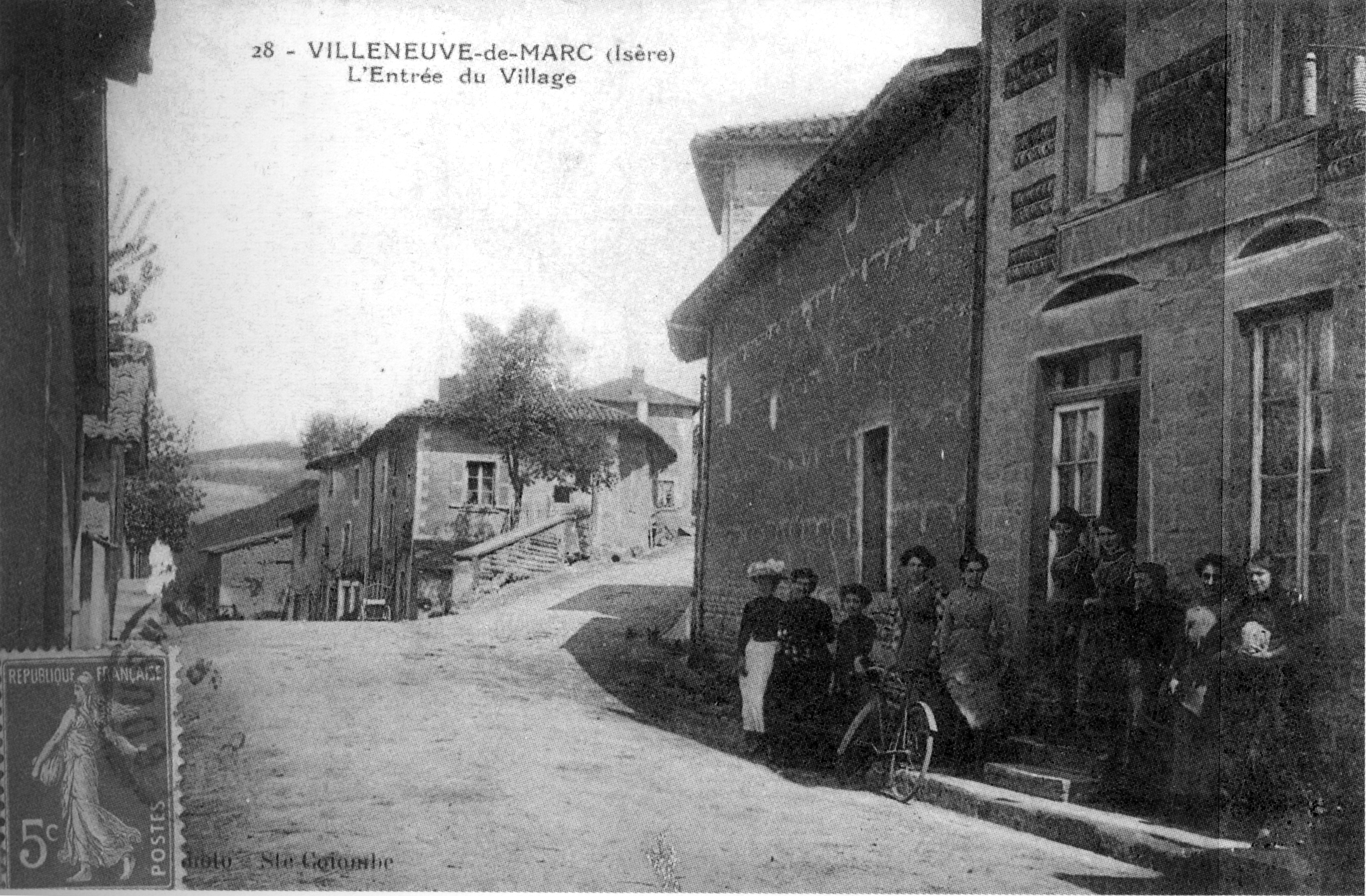 Villeneuve-de-Marc, l'entrée du village, en 1910